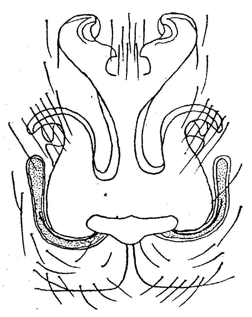 Epigyne/Vulva von Pisaura mirabilis. Anmerkungen:In Dahl 1908, S. 258ff sub Pisaura listeri (Scop.); Bildunterschrift: "Fig. 23. Vulva von Pisaura listeri."